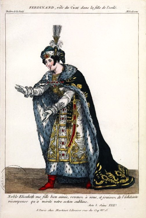 Costume de scène pour L'Exilé (Guilbert de Pixerécourt)